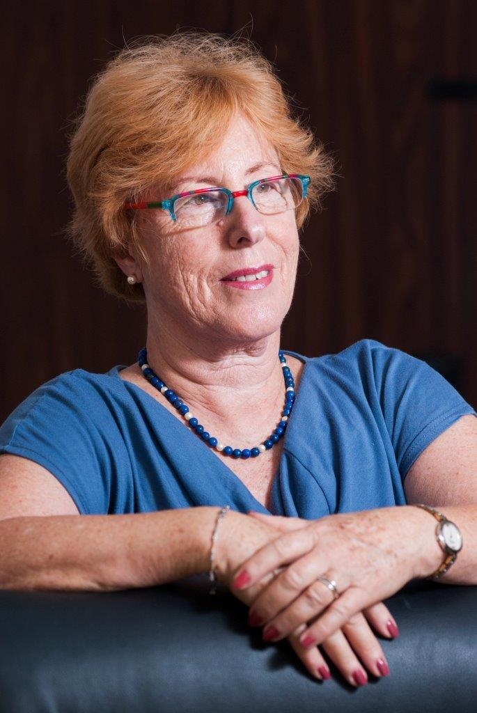 שונית רייטר